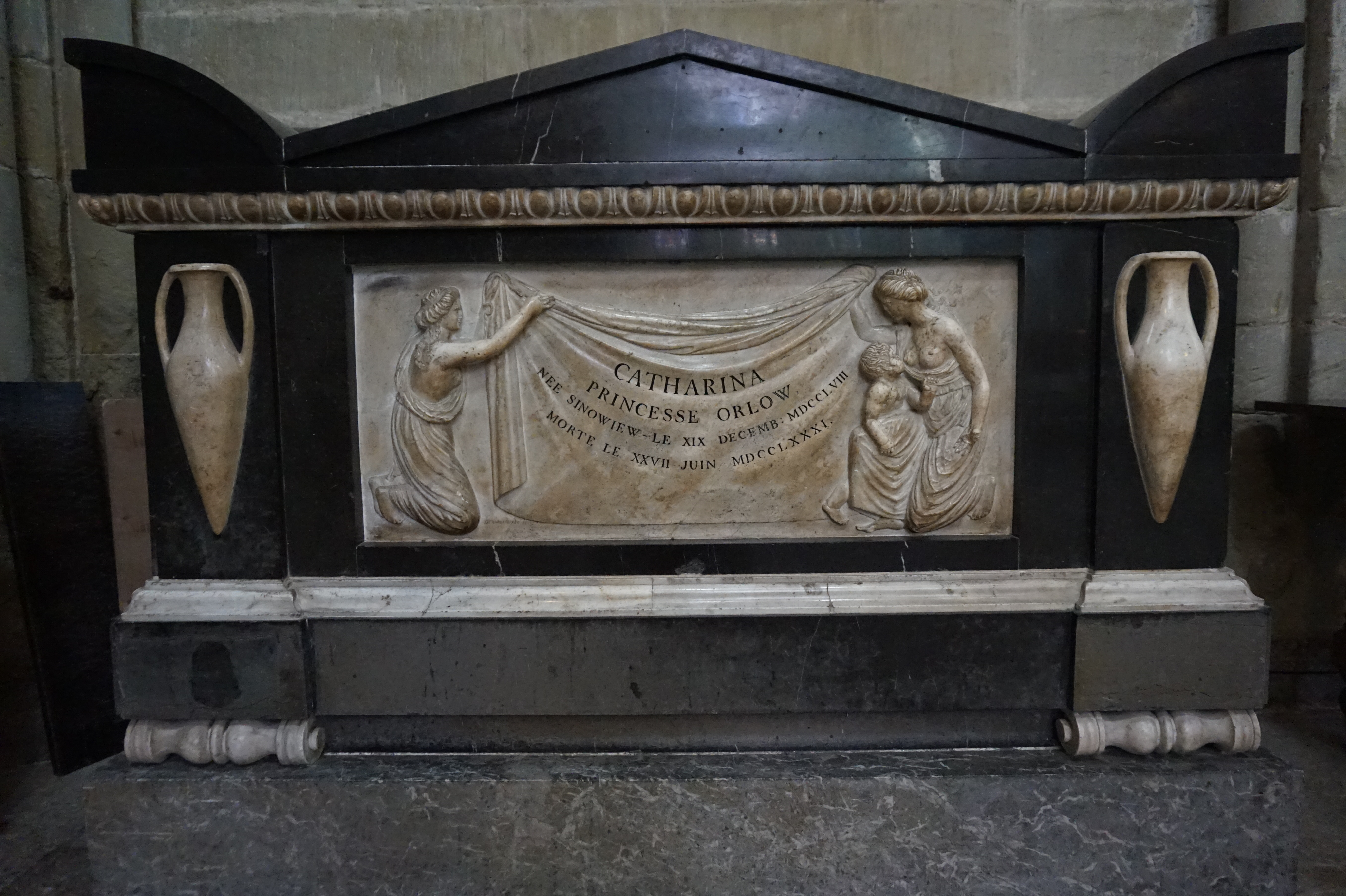 Tombeau de Ekaterina Nicolayevna Zinovieva (1758-1781) épouse Orlow, en la cathédrale de Lausanne. Inscription : Catharina princesse Orlow née Zinowiew le XIX décemb. MDCCLVIII morte le XXVII juin MDCCLXXXI.